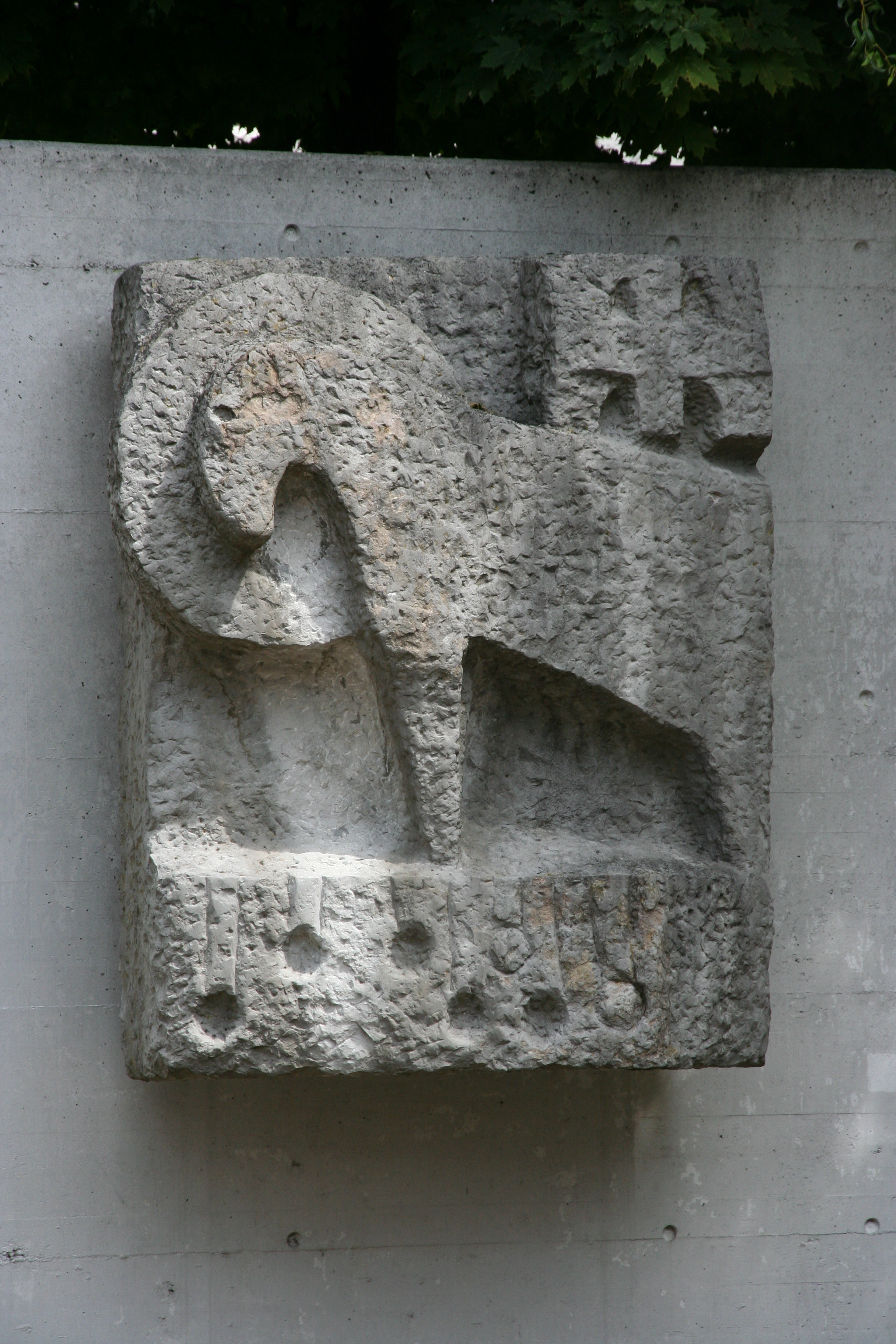 Skulptur Lamm Gottes (Alfred Huber 1967/1968) an der römisch-katholische Pfarrkirche Christ König Biel/Bienne